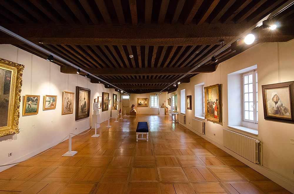 Une salle du musée Georges-Garret de Vesoul